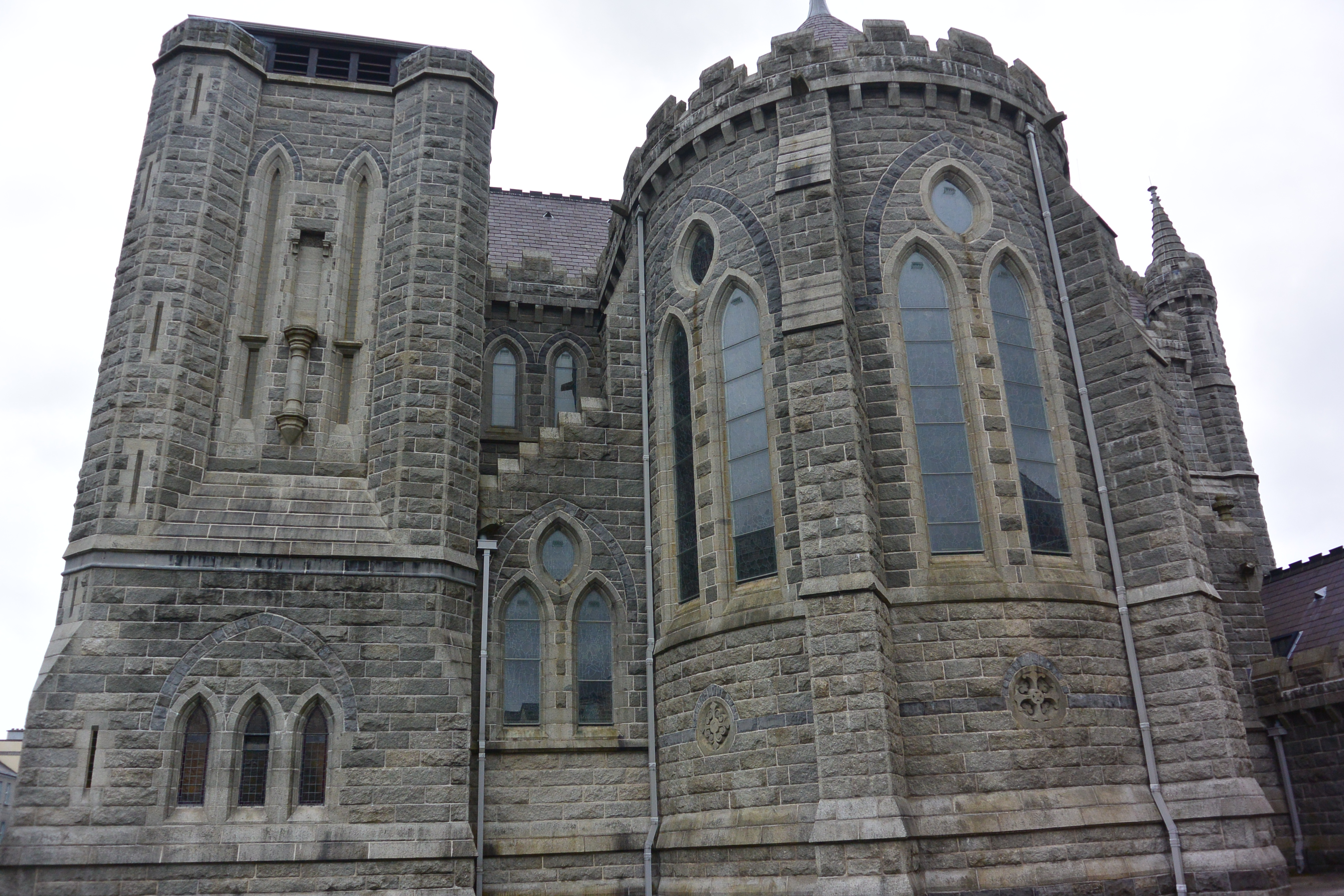 O'Connel Mémorial Church Cahersiveen